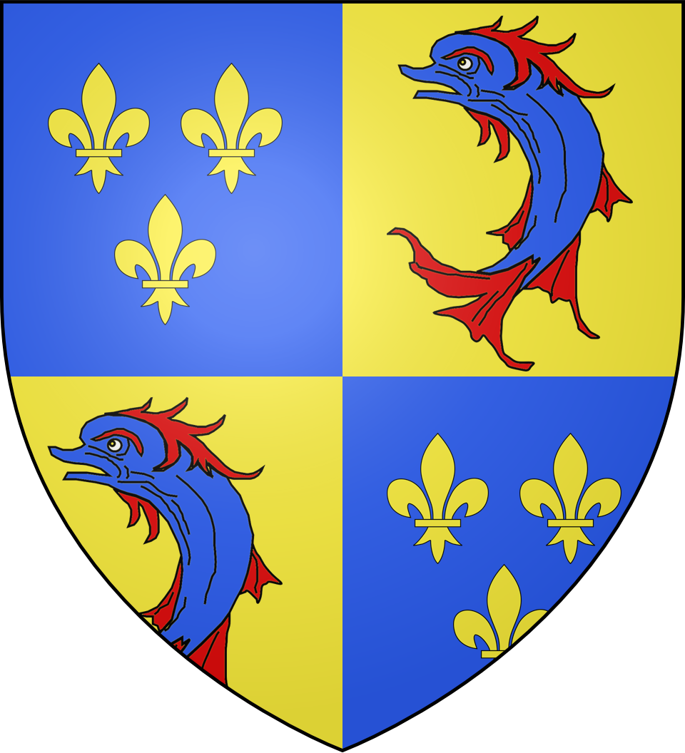 Blason des dauphins de France : écartelé en 1 et 4 d'azur aux trois fleurs de lys d'or et au 2 et 3 d'or au dauphin d'azur, crêté, barbé, loré, peautré et oreillé de gueules